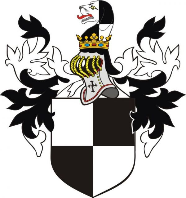 Herb rodowy Hohenzollernów (opr.: AK-P)